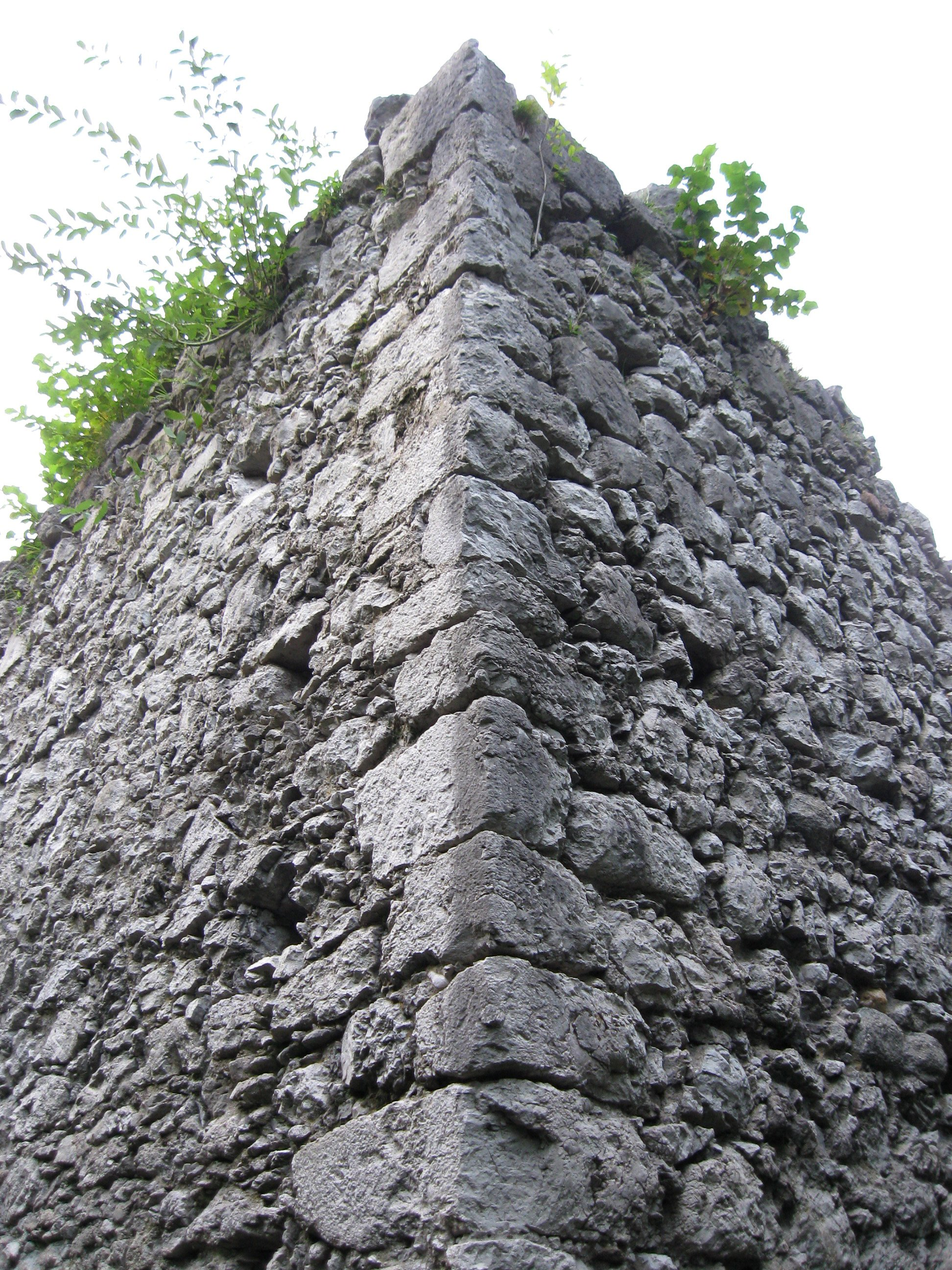 Burgruine Kirnstein, von der 1504 zerstörten Burg Umfassungsmauern in Teilen und Reste des Palas erhalten, mittelalterlich, 2. Viertel 15. Jh.